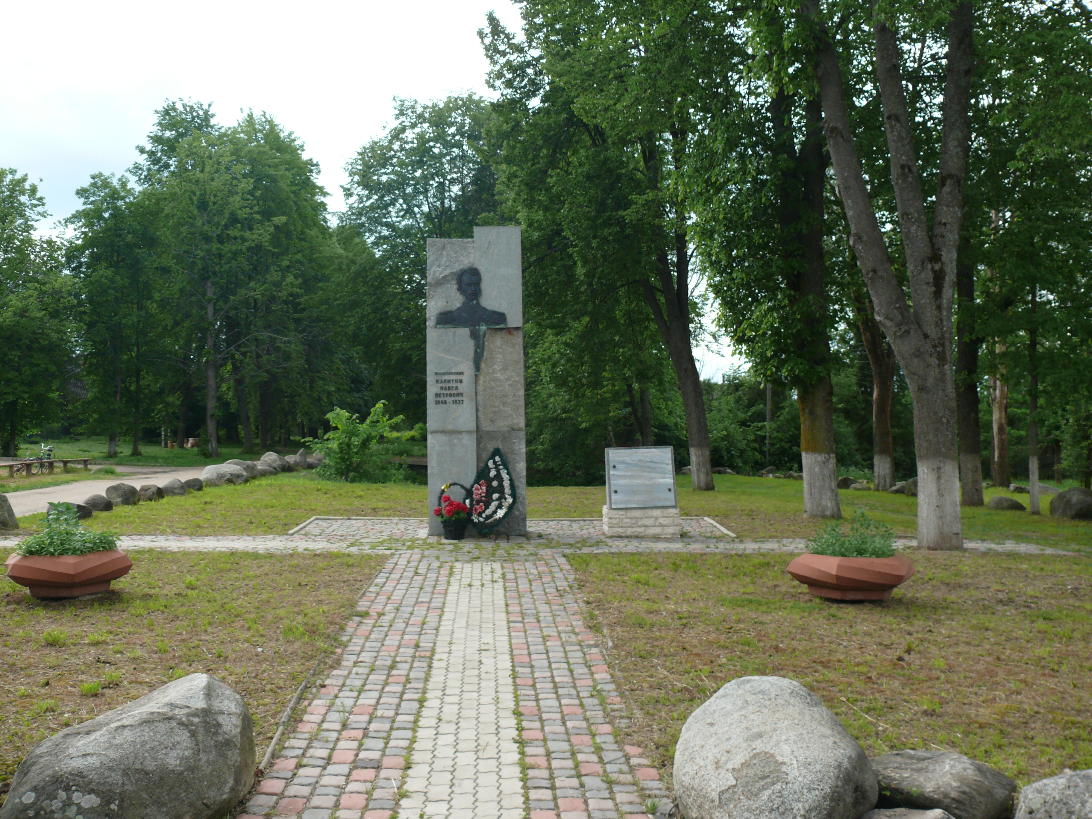 Памятник подполковнику Калитину Павлу Петровичу в Холме, Новгородская область